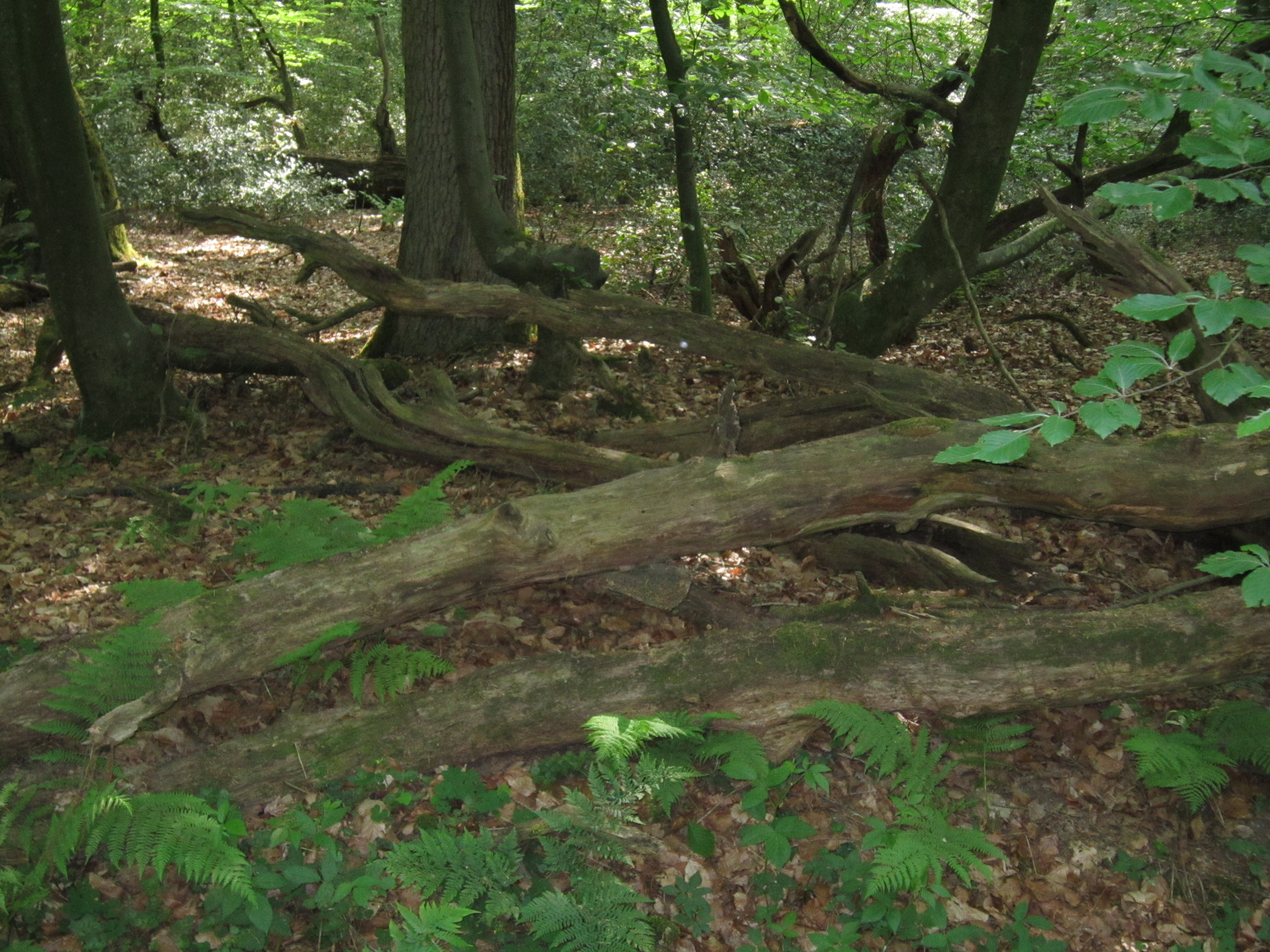 Naturwald im Naturschutzgebiet Herrenholz in Goldenstedt, Niedersachsen (das Foto wurde vom Wirtschaftsweg aus aufgenommen, der zum Forsthaus führt)